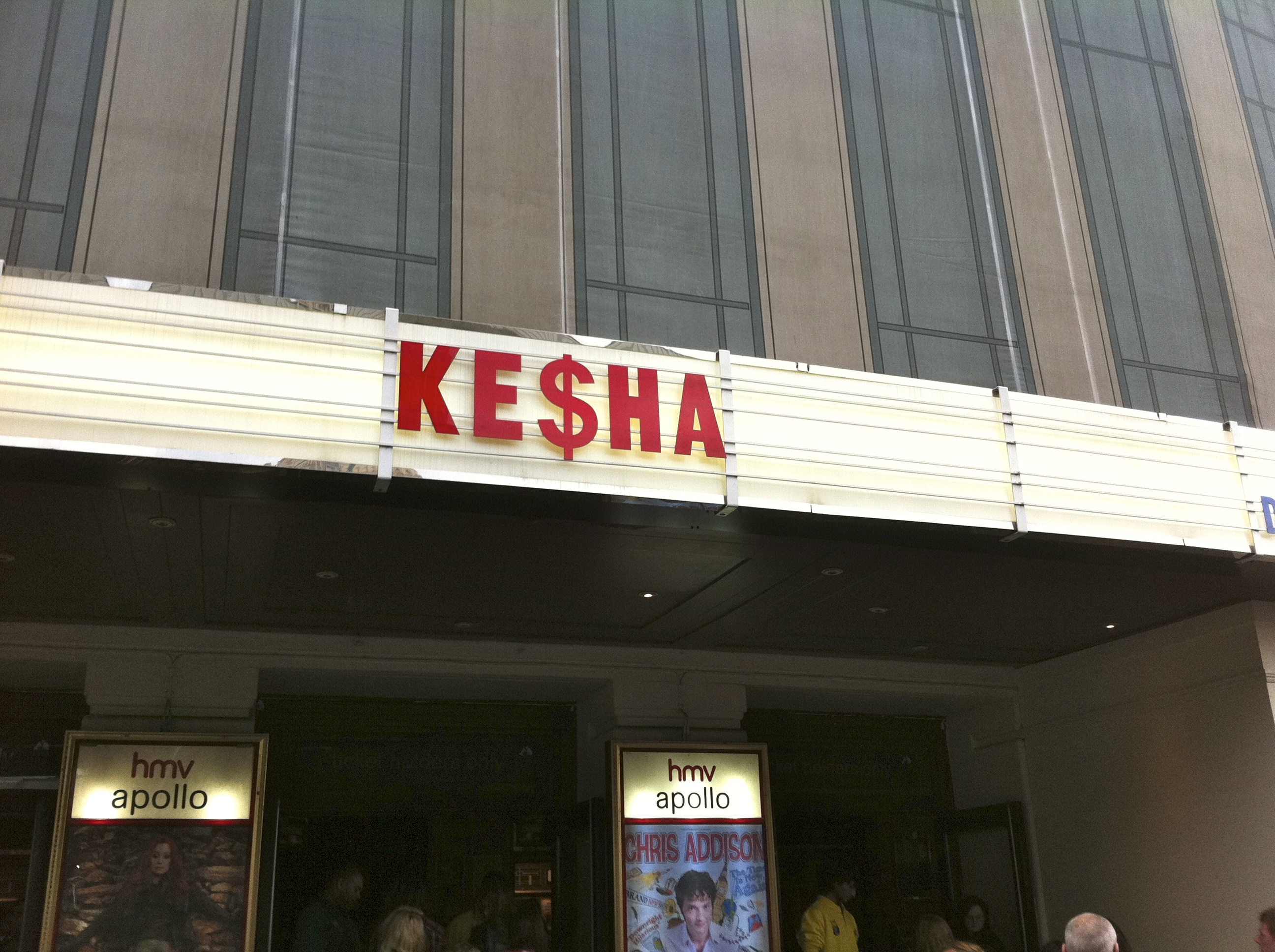 Cartel en la marquesina del el Hammersmith Apollo de Londres, anunciando un concierto de la artista Ke$ha